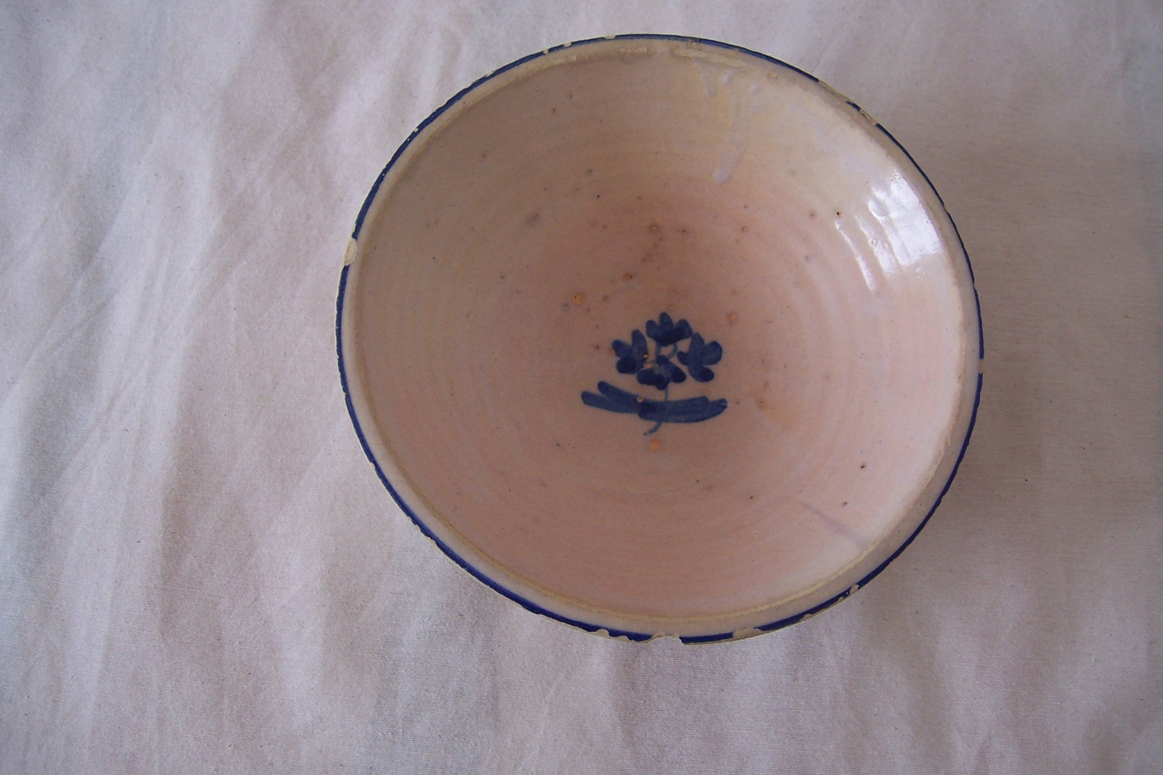 Cuenco de barro de los años 40; cerámica popular española. Piezas como ésta ofrecían por las casas a cambio de un saco de restos de telas y trapos o de un buen montón de papel. Si en la casa había niñas pequeñas ofrecían cacharritos a tamaño de juguete. Años 40 y 50 del siglo XX.